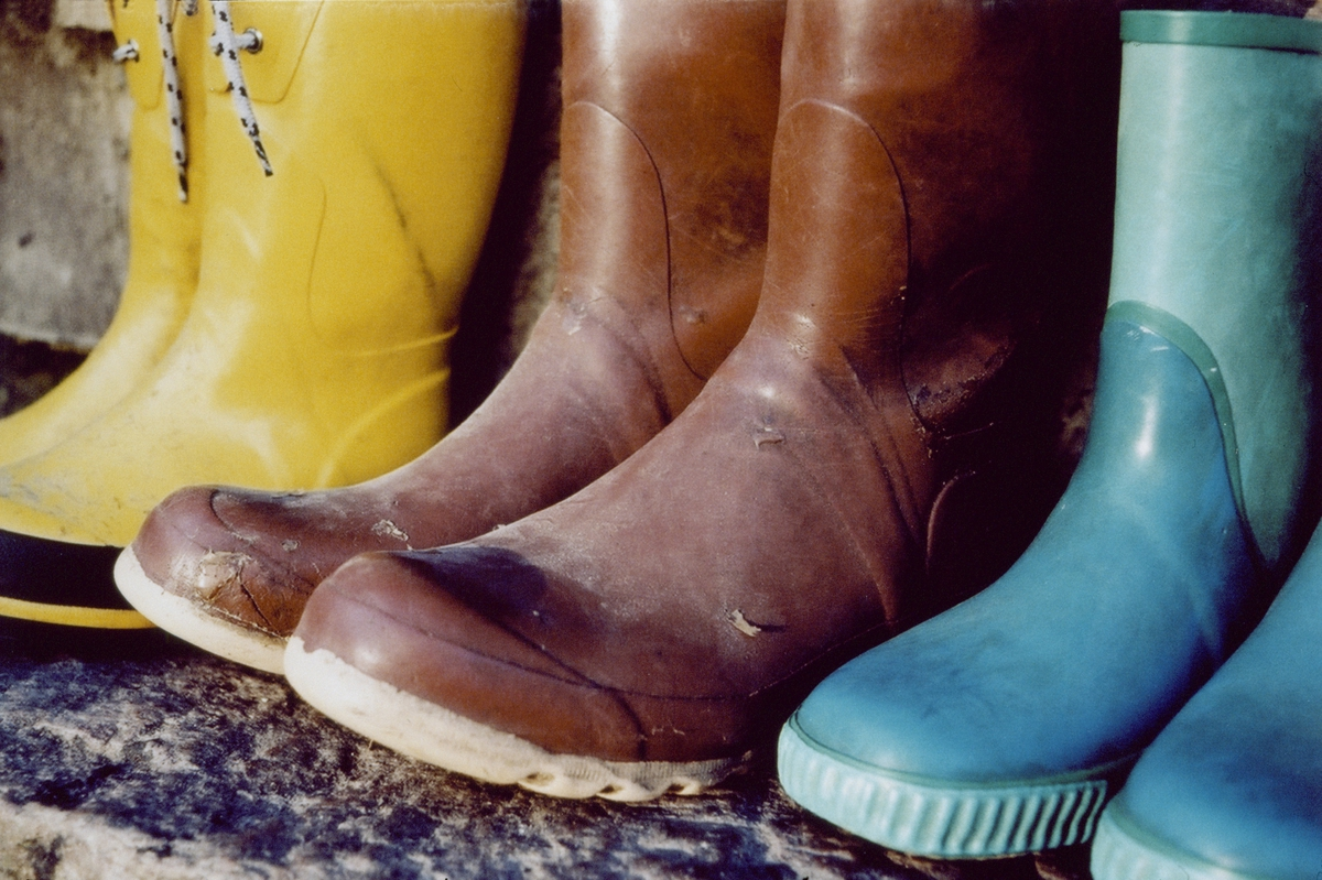 Tre par gummistövlar på rad.